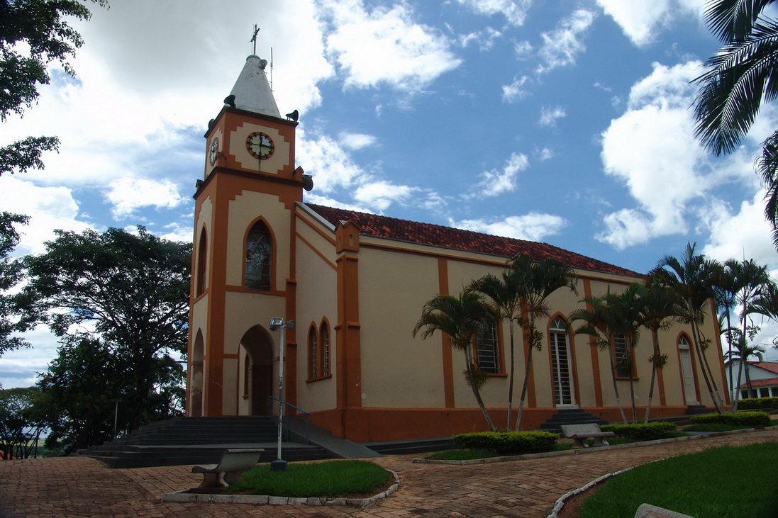 Vistas do município de Lucianópolis, estado de São Paulo, Brasil.